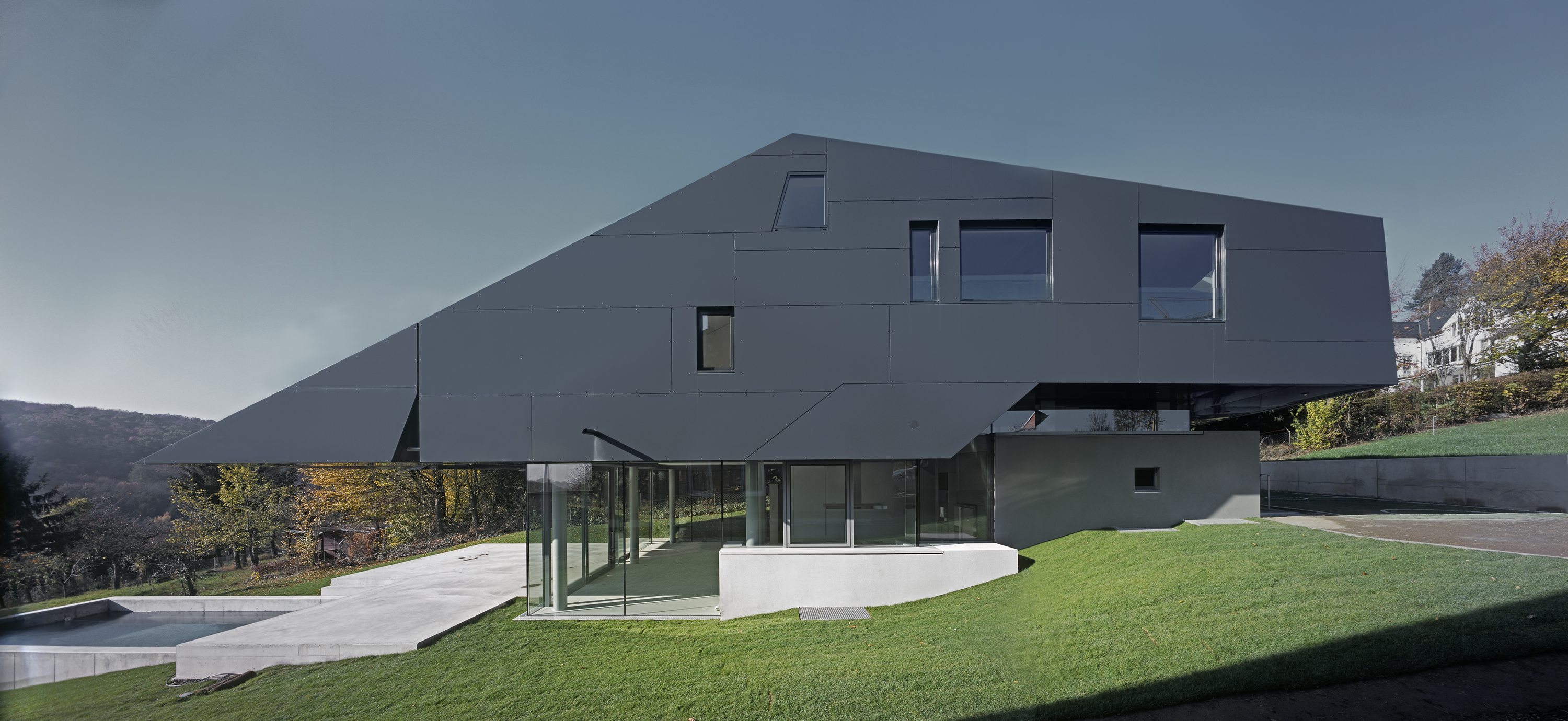 Wohnhaus F Meixner Schlüter Wendt Architekten